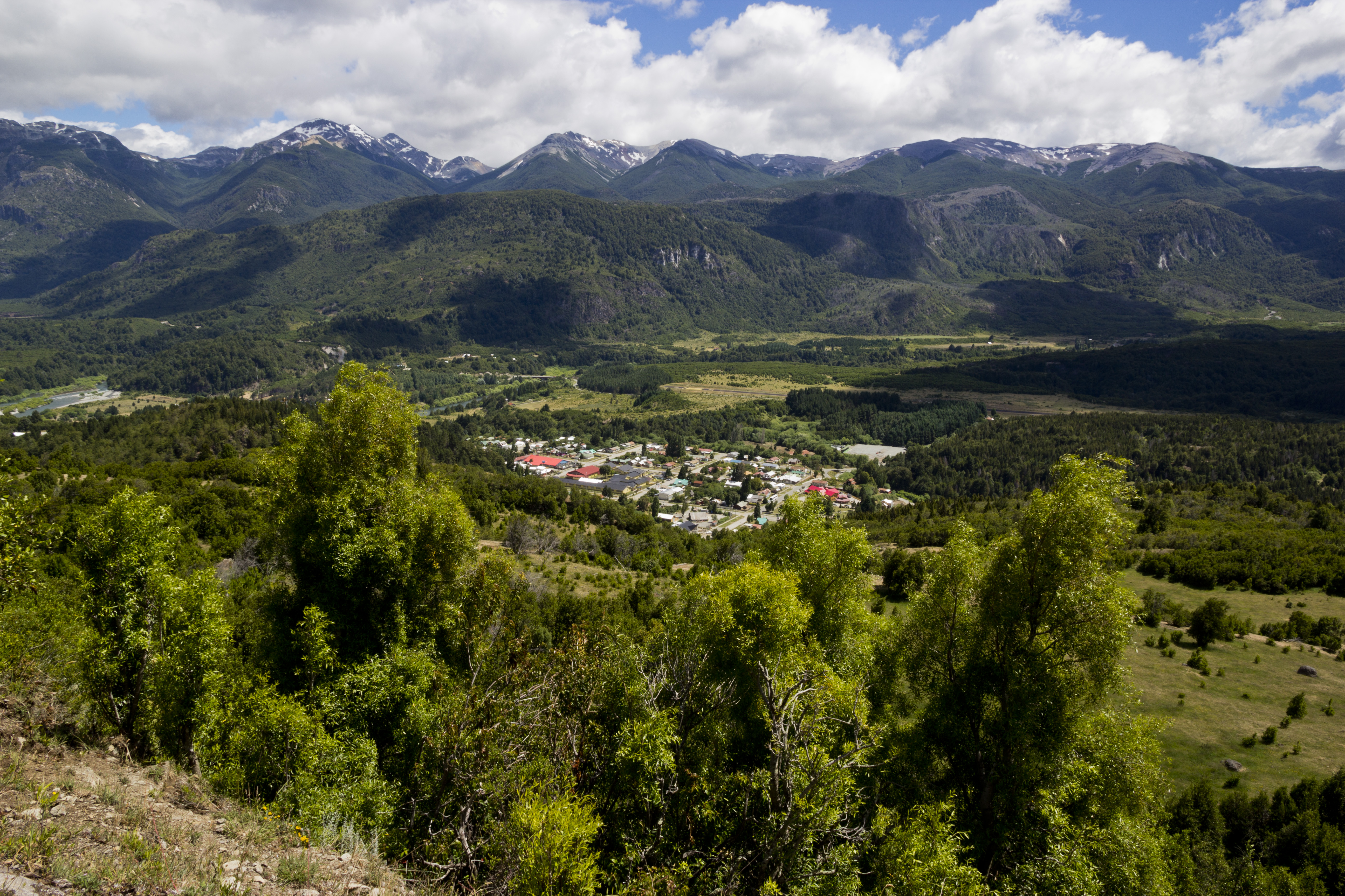 Palena (Chile), desde cerro Bandera